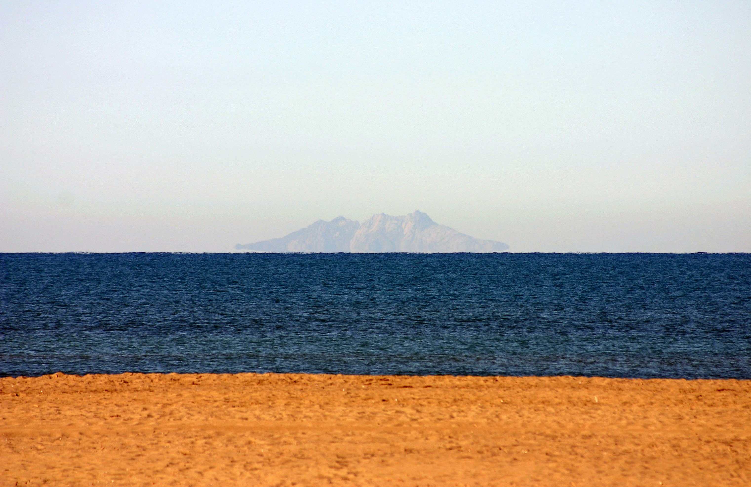 Isola di Montecristo, Italy